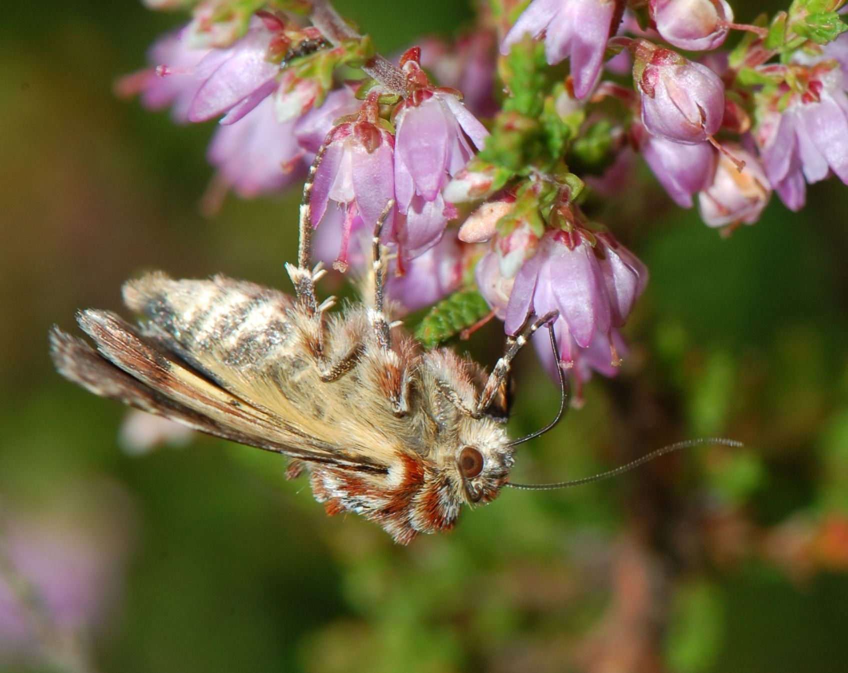 Anarta myrtilli (Noctuidae) an Besenheide (Calluna vulgaris), Himmelpfort bei Lychen, Land Brandenburg